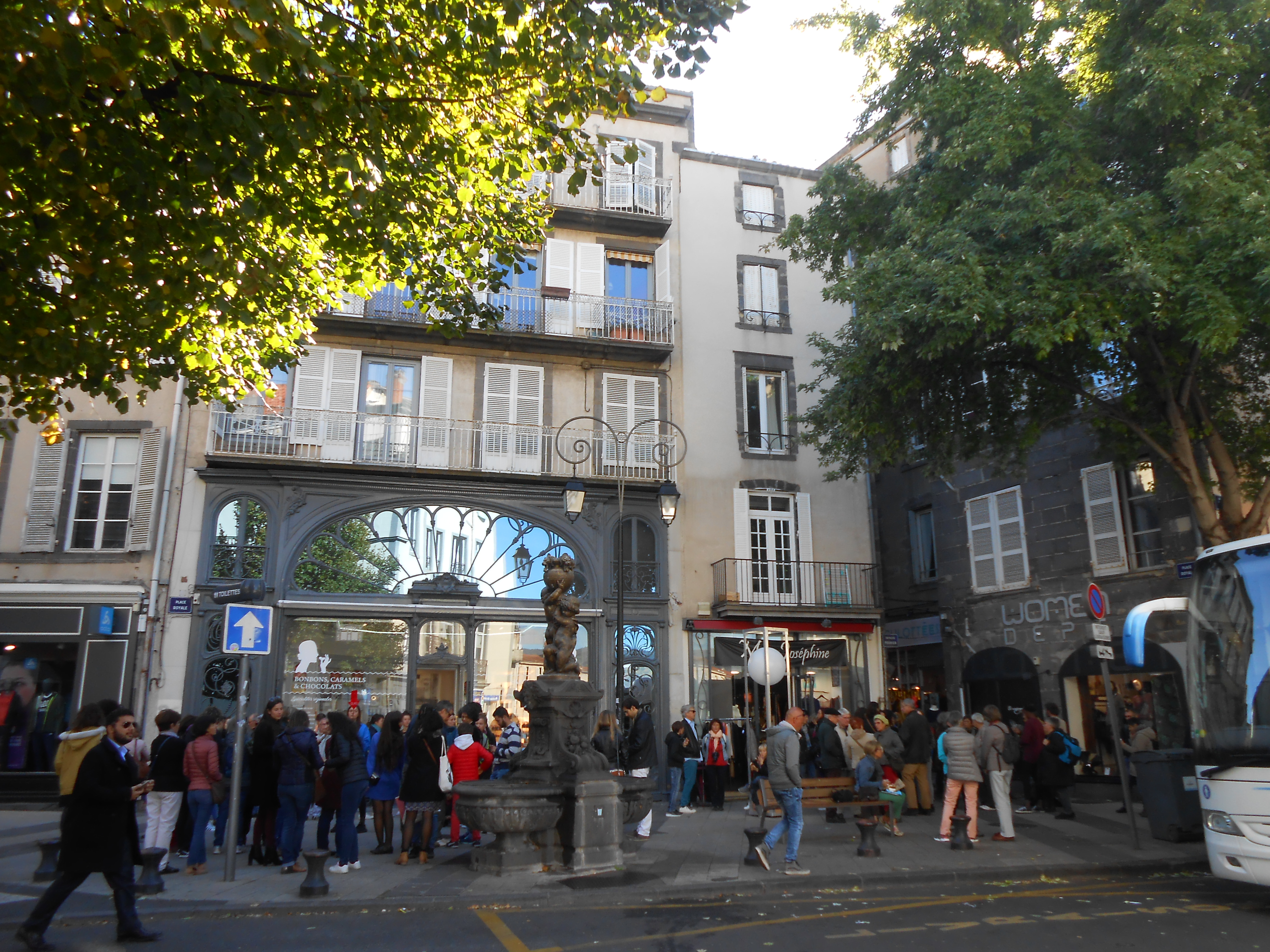 Place Royale, Clermont-Ferrand, Auvergne.